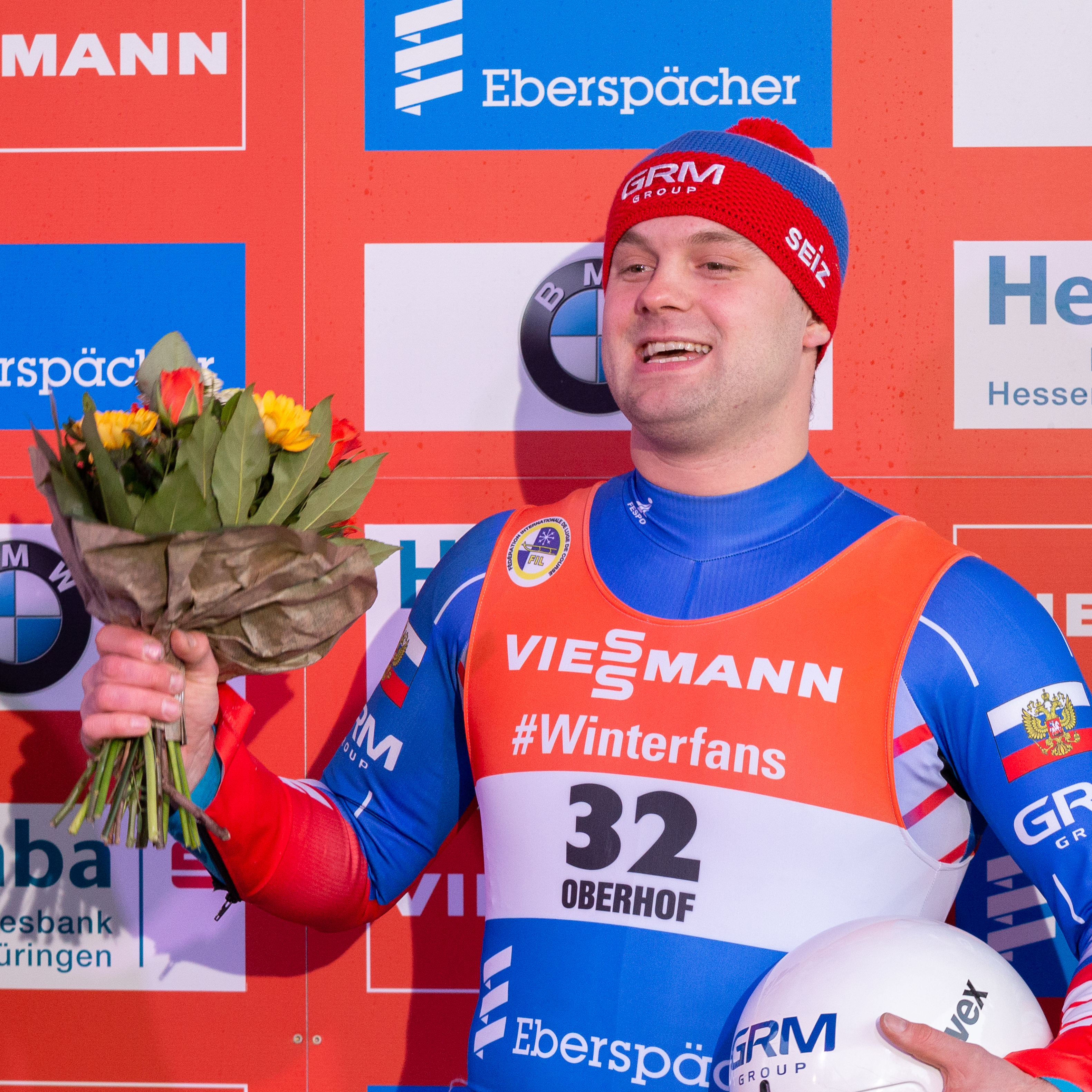 Viessmann Luge World Cup Oberhof; Semen Pavlichenko (RUS, Russland); Sieger, Erstplatzierter, Goldmedaille, gold medal; Flower Ceremony, Blumenzeremonie, Siegerehrung; Jubel, celebration